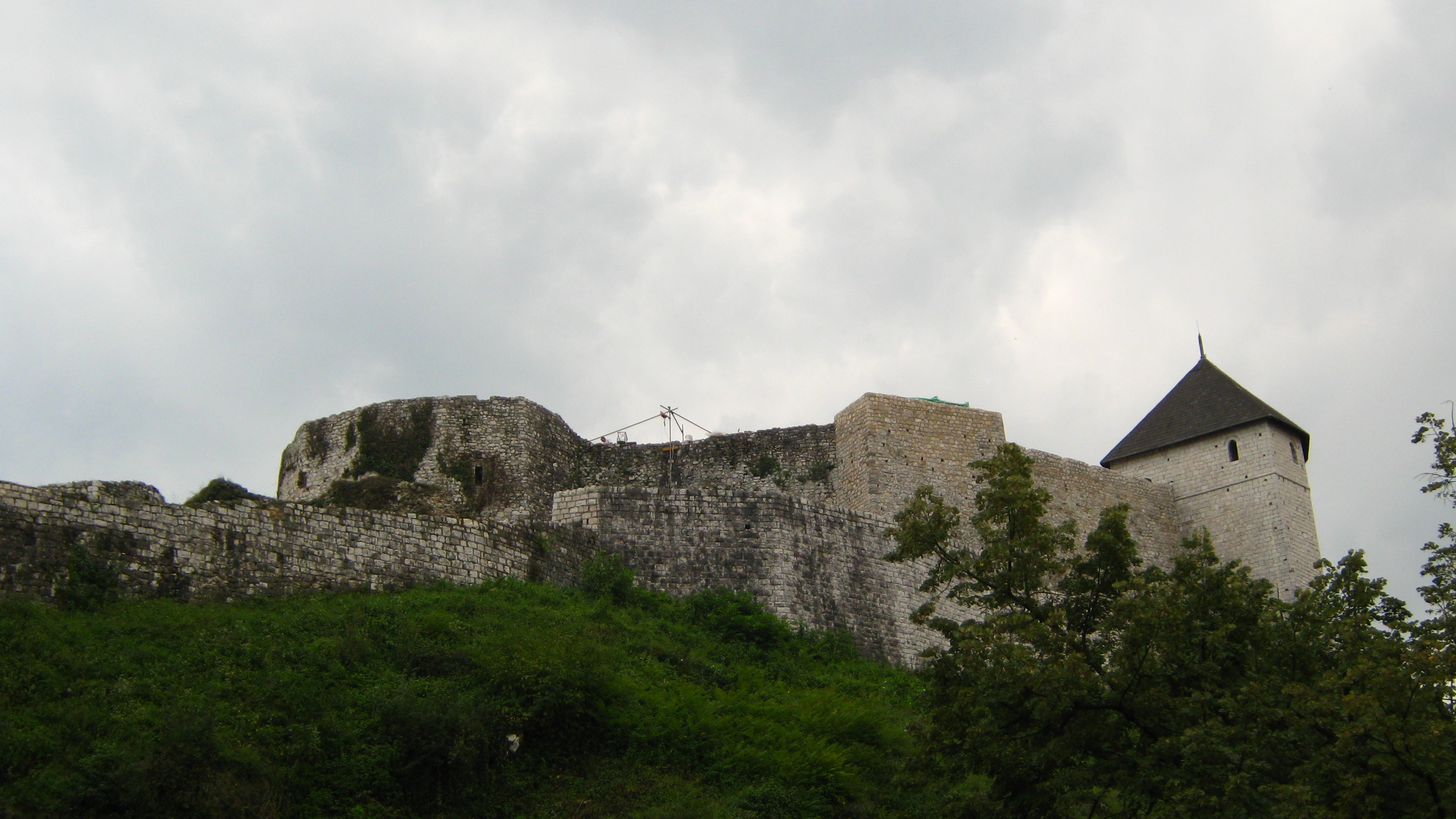 Тешањ, ФБиХ, БиХ